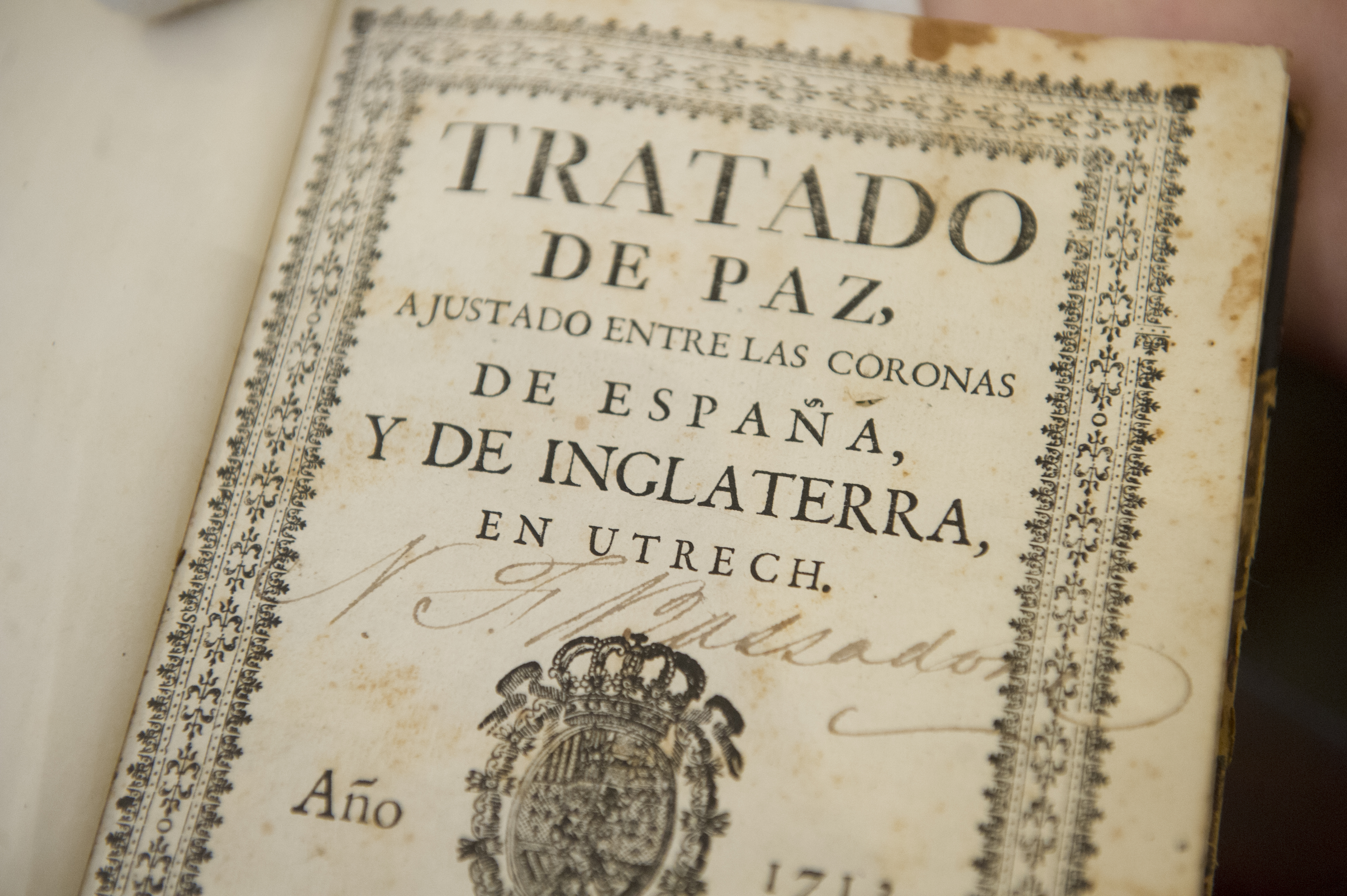 Gibraltar - 300 años de Utrecht 13.7.2013 80